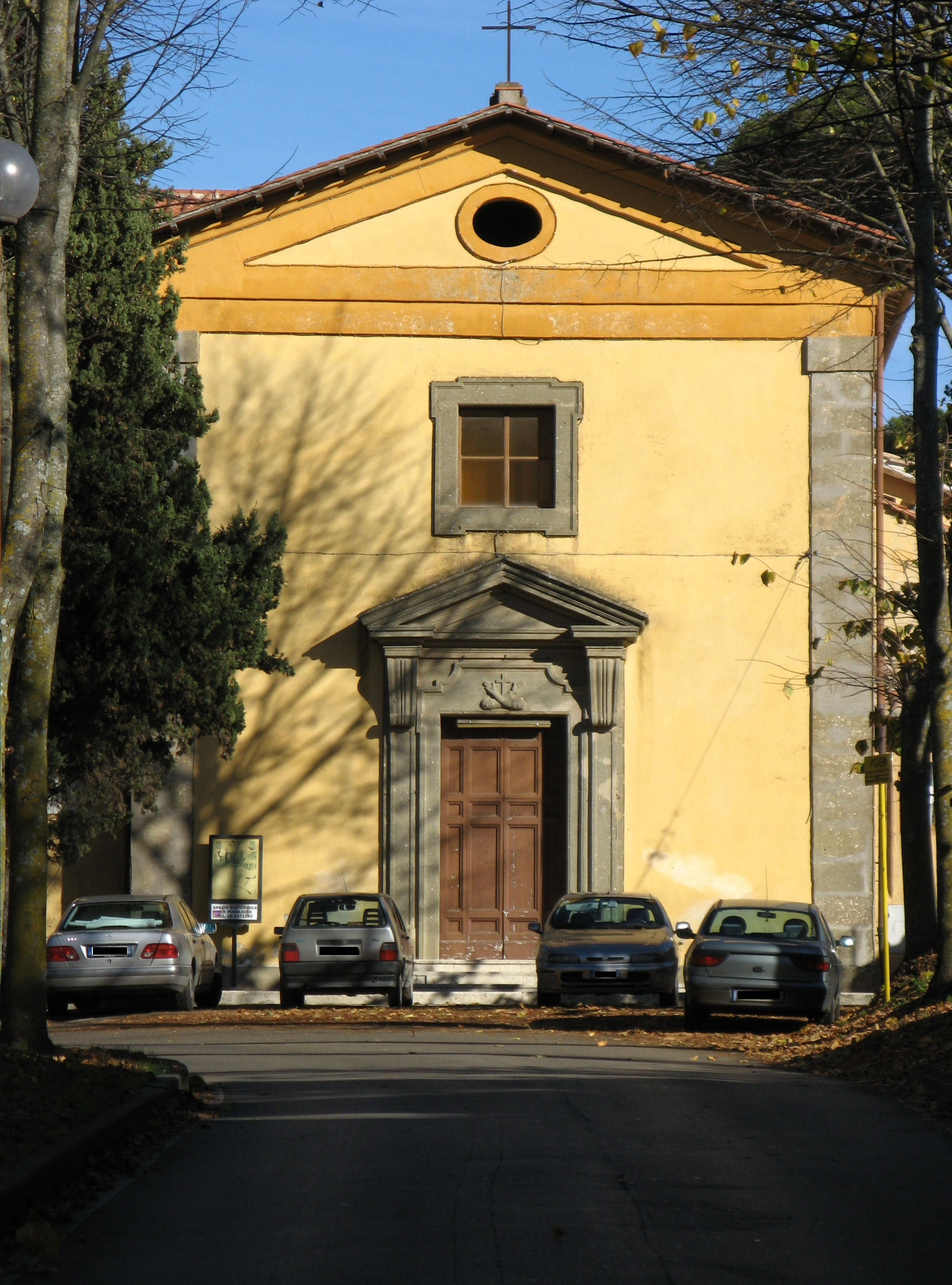 Genzano di Roma, Chiesa dei Cappuccini (S. Francesco d'Assisi), facciata del 1643